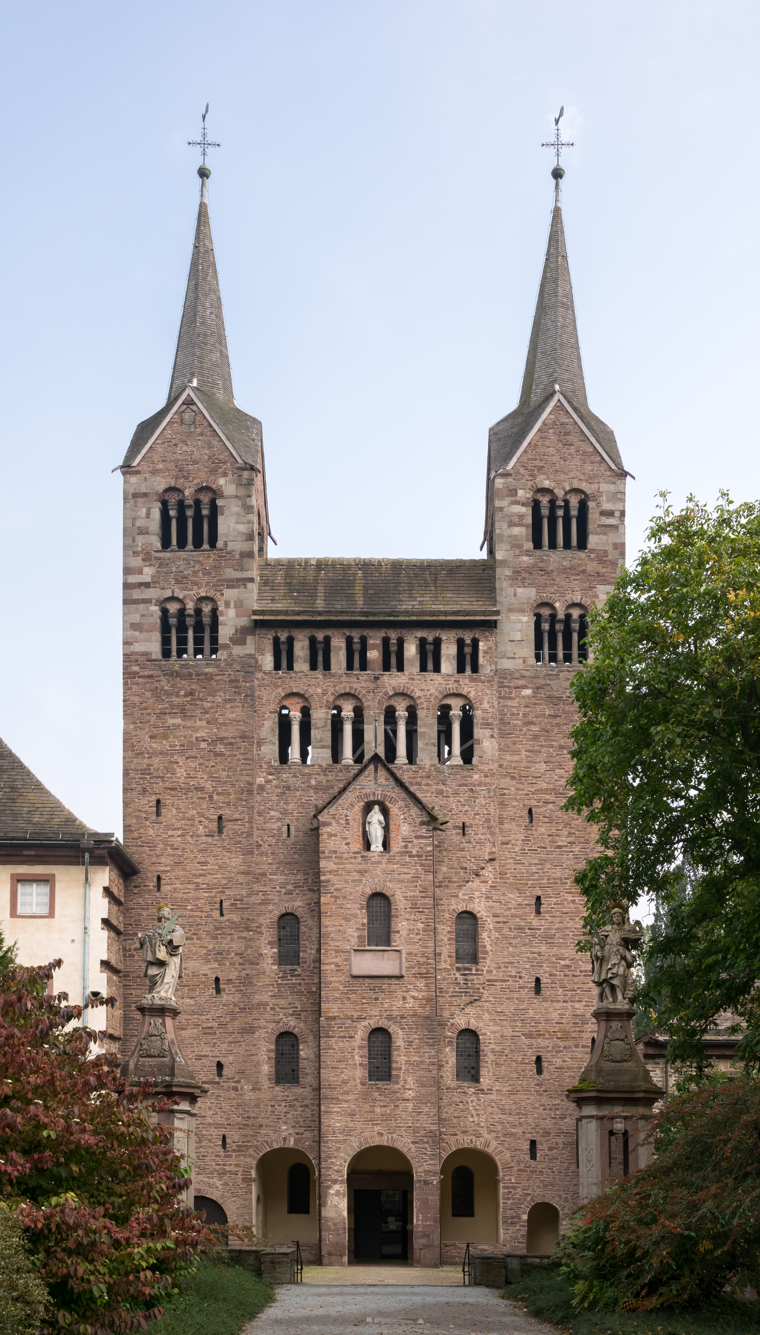 Westwerk der Abteikirche St. Stephanus und Vitus, Corvey